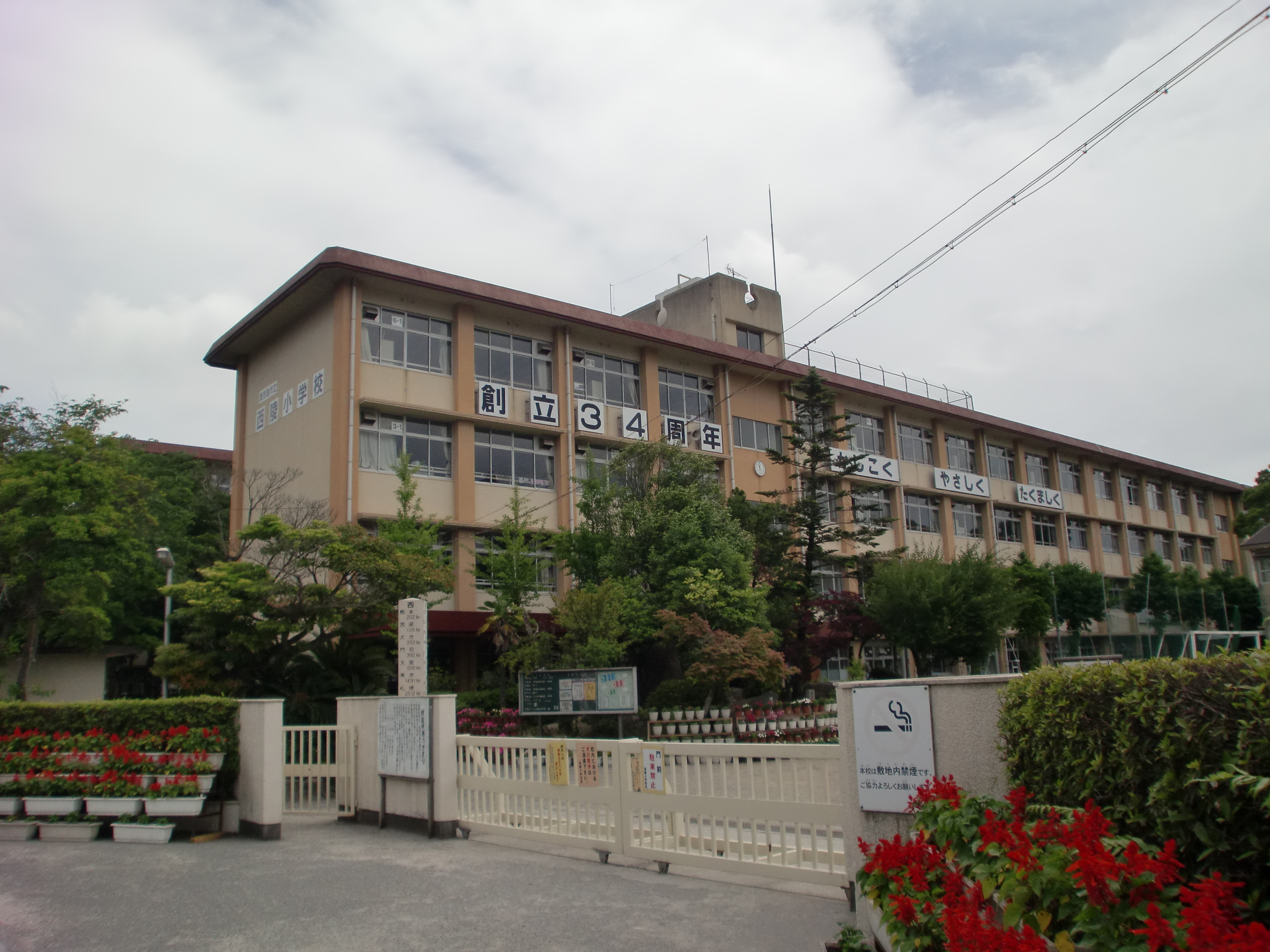 鹿児島市立西陵小学校の外観。